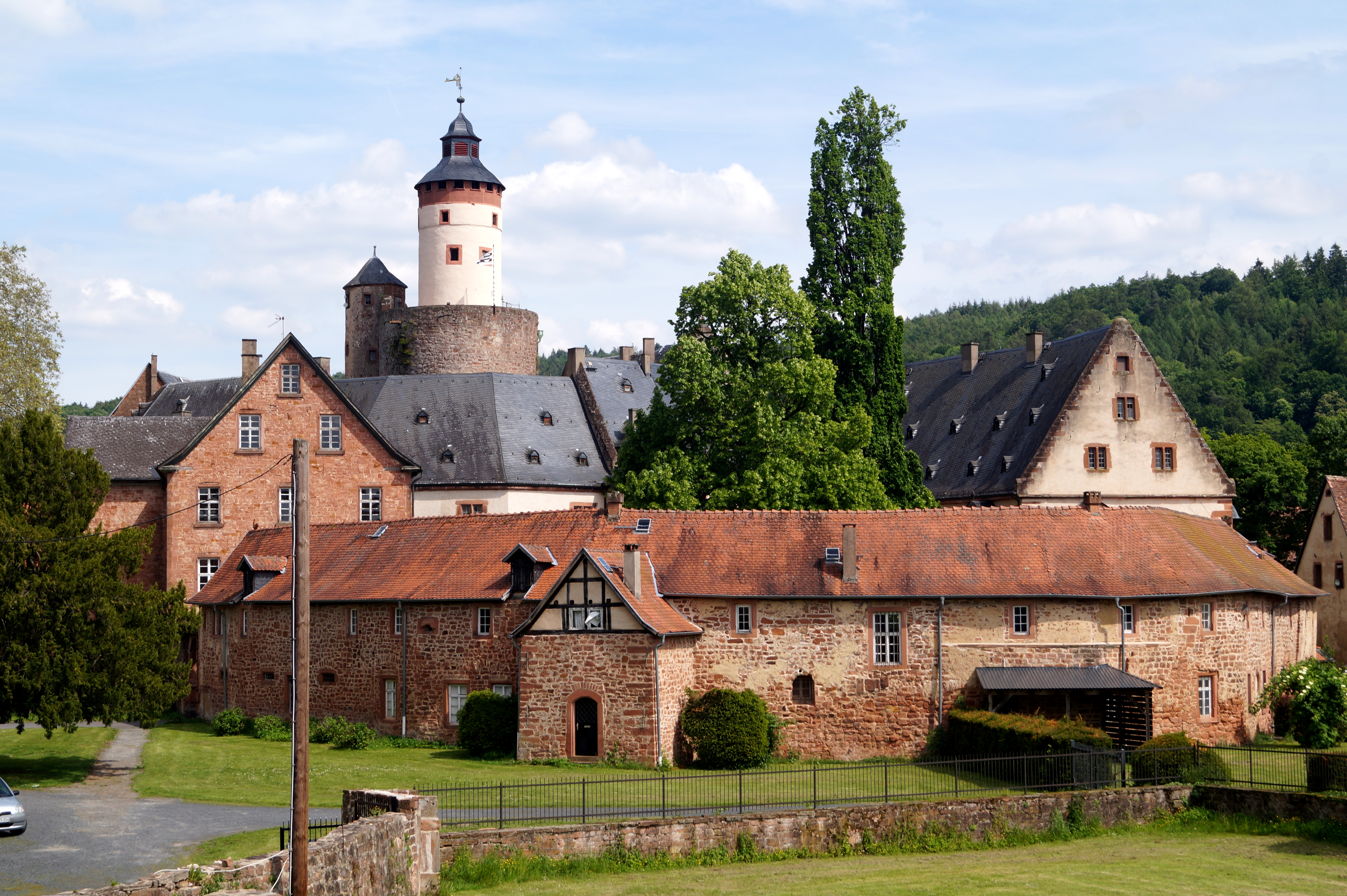 Schloss Büdingen, Ansicht von WNW.